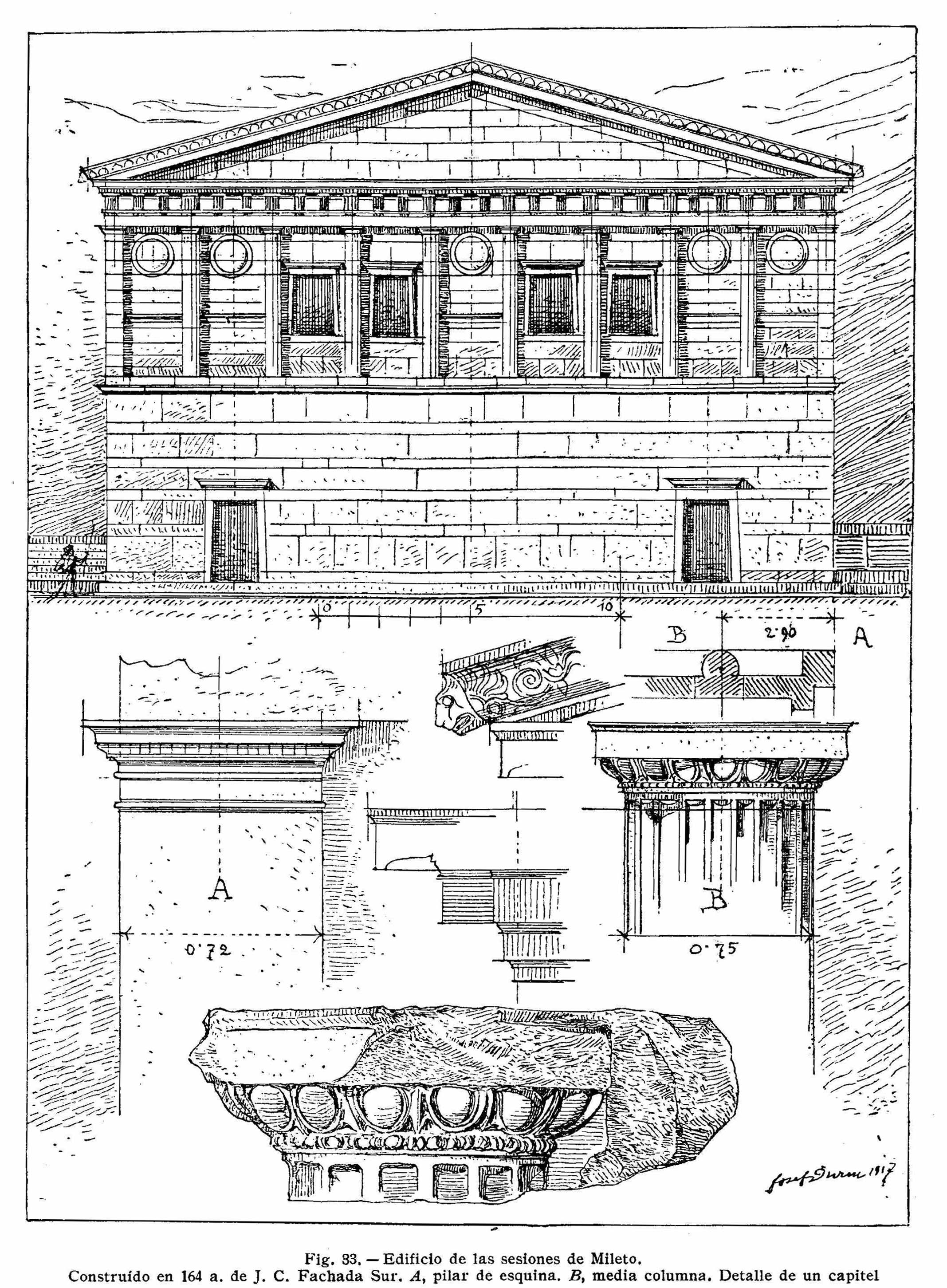 Edificio de la asamblea de Mileto. Construido en 164 a.C. Fachada Sur. A, pilar de esquina. B, media columna. Detalle de un capitel. (textos del dibujo en español)